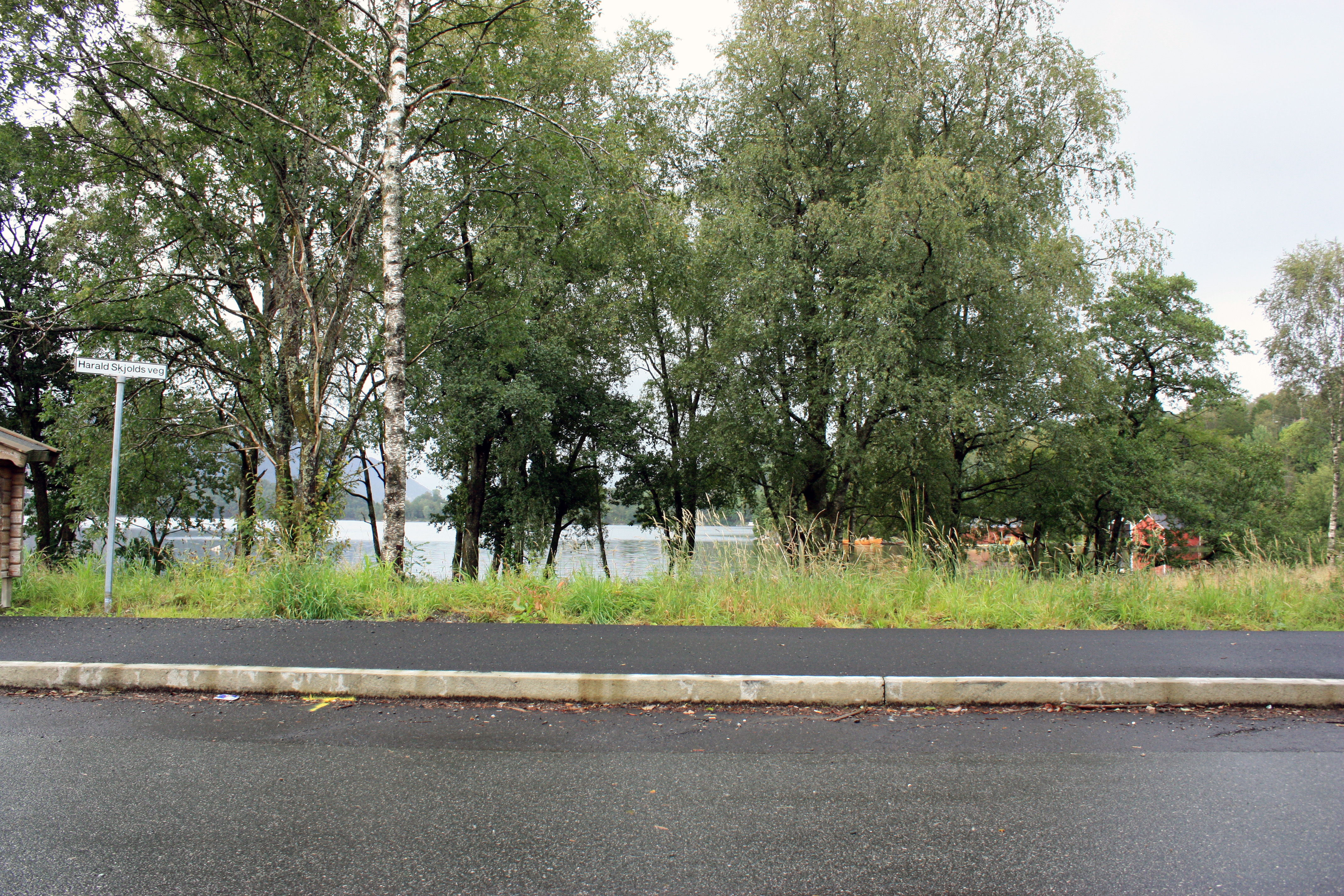 Harald Skjolds veg, Fana, Bergen.